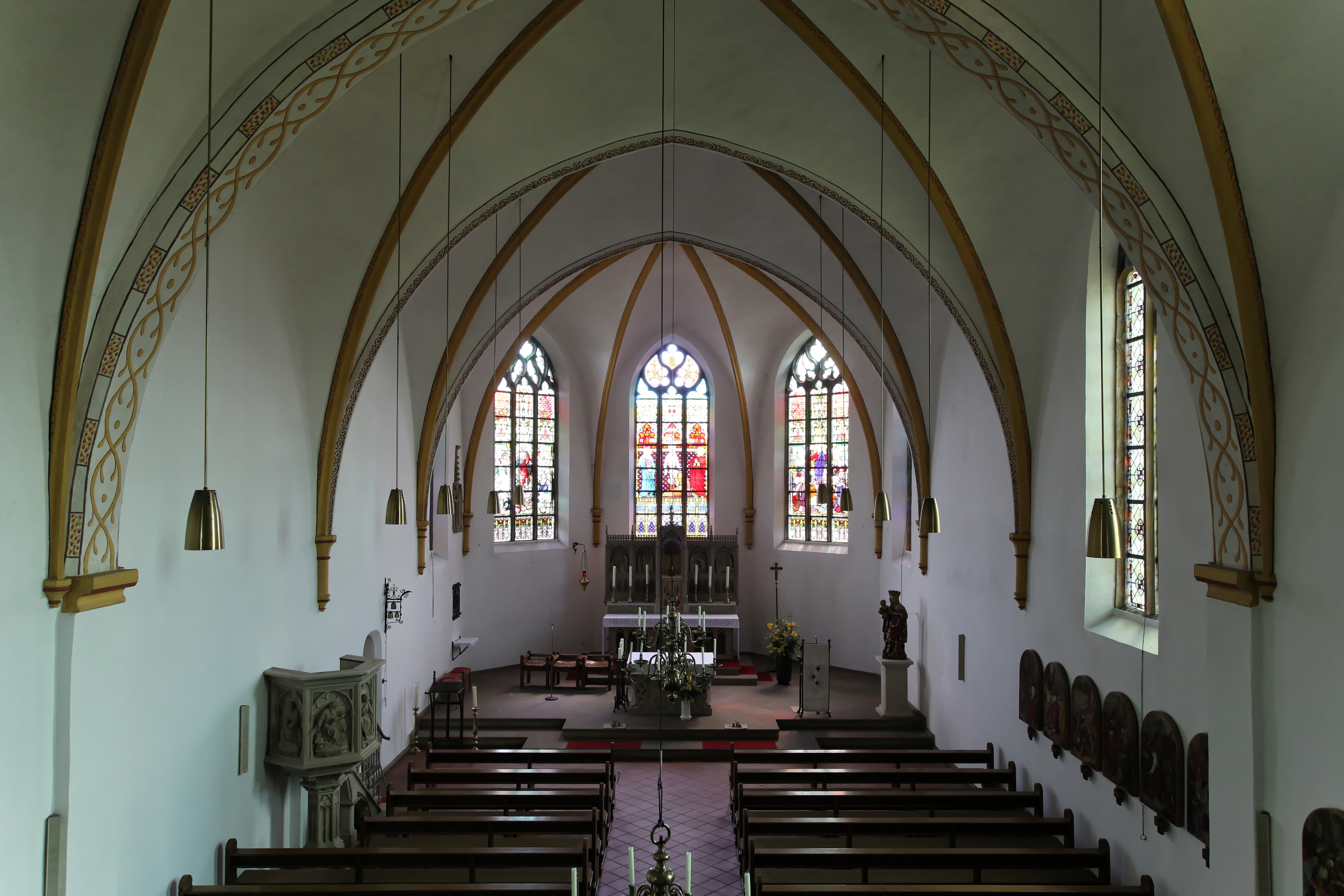 St.-Georg-Kirche, Kirchstraße in Steinbild, Kluse (Emsland)